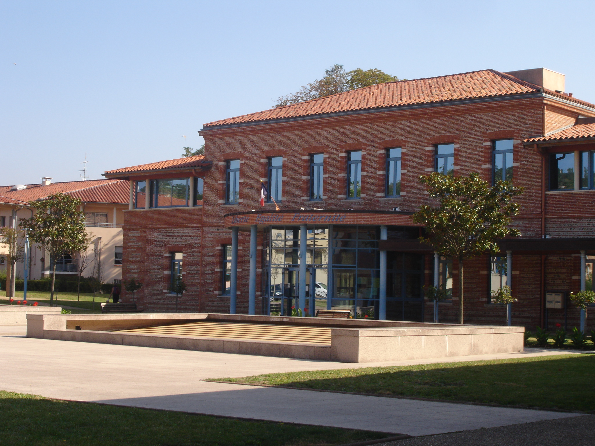 Castanet-Tolosan (Haute-Garonne, Midi-Pyrénées, France) : La mairie.